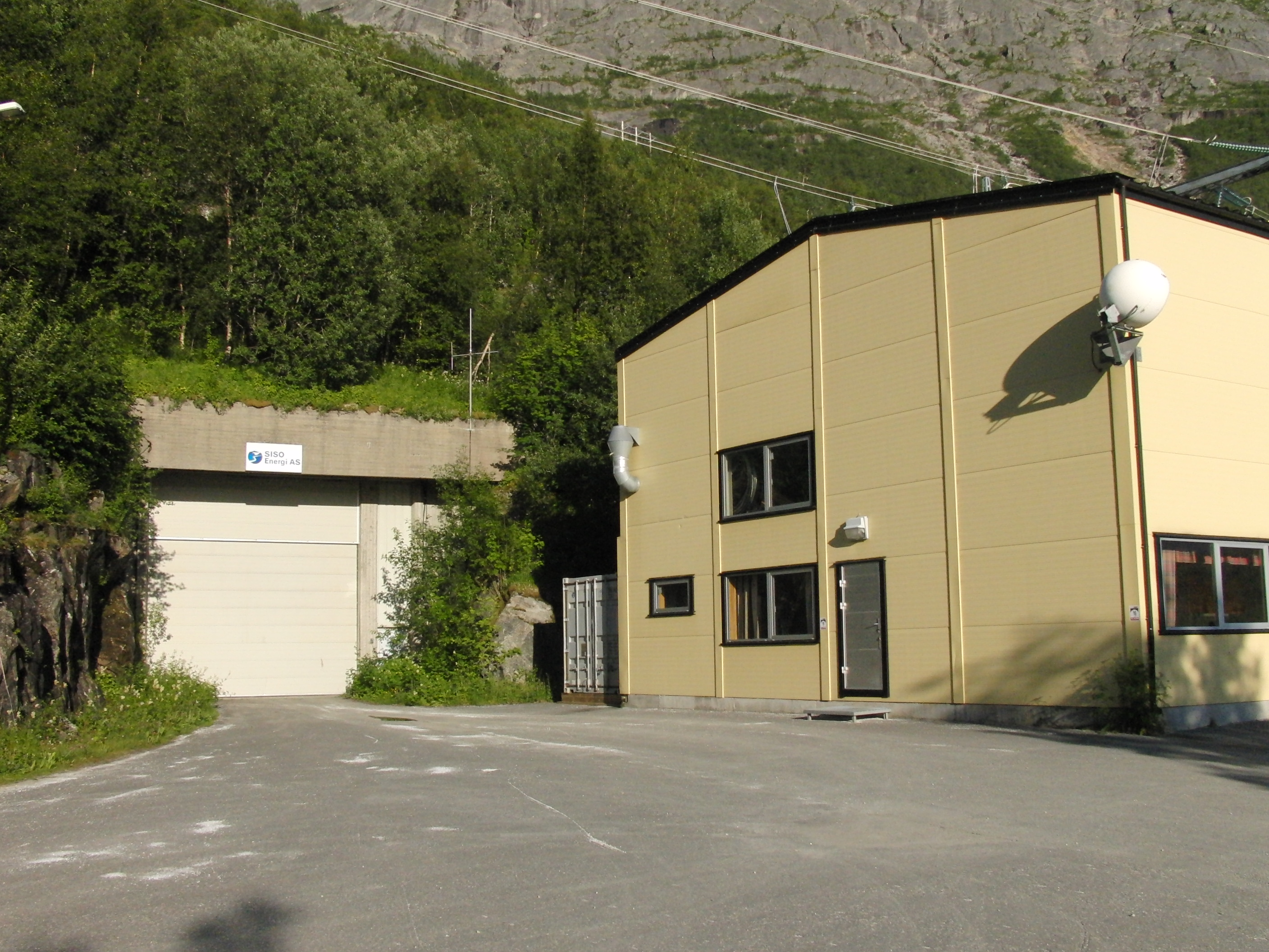 Siso kraftverk